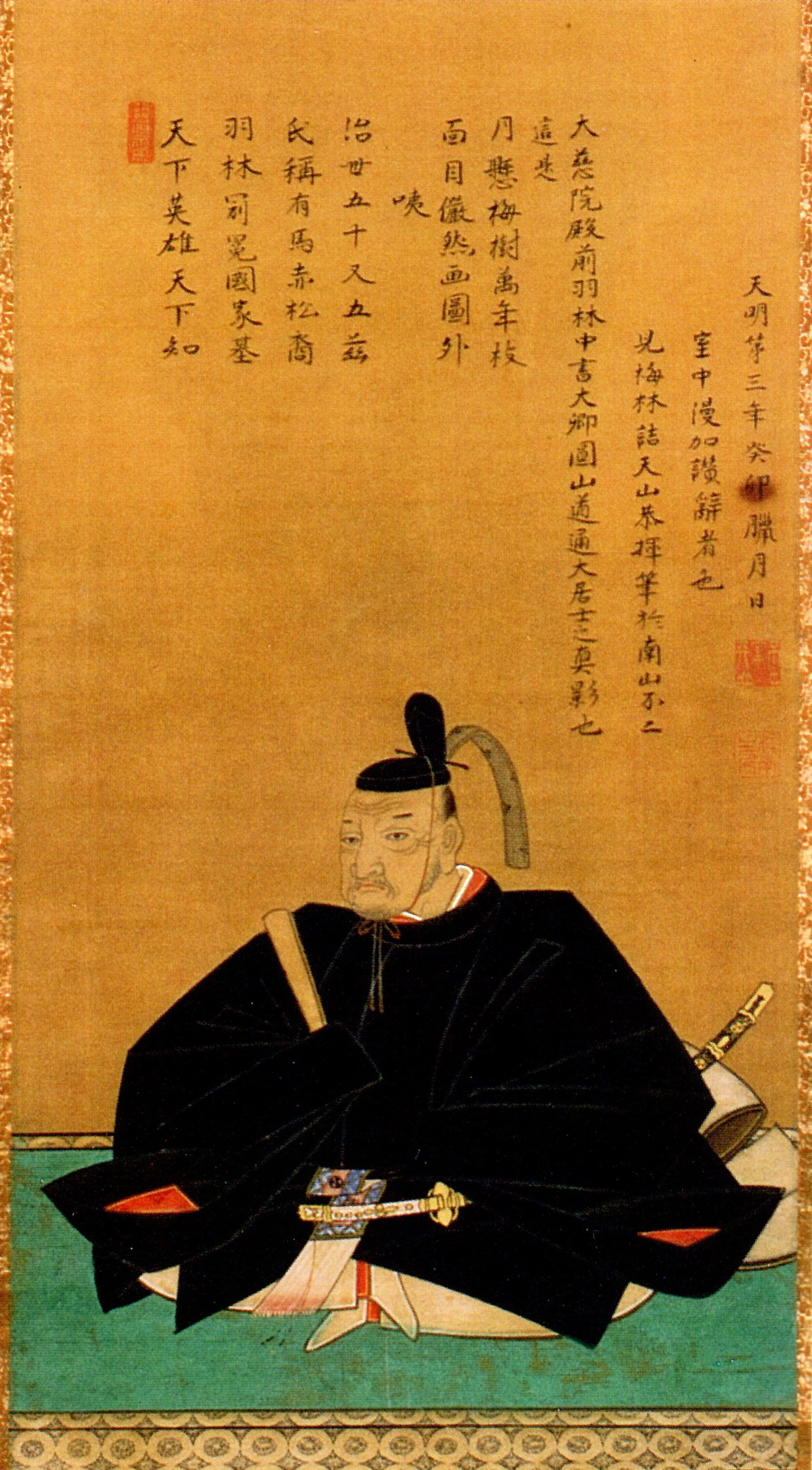 有馬頼徸の肖像。